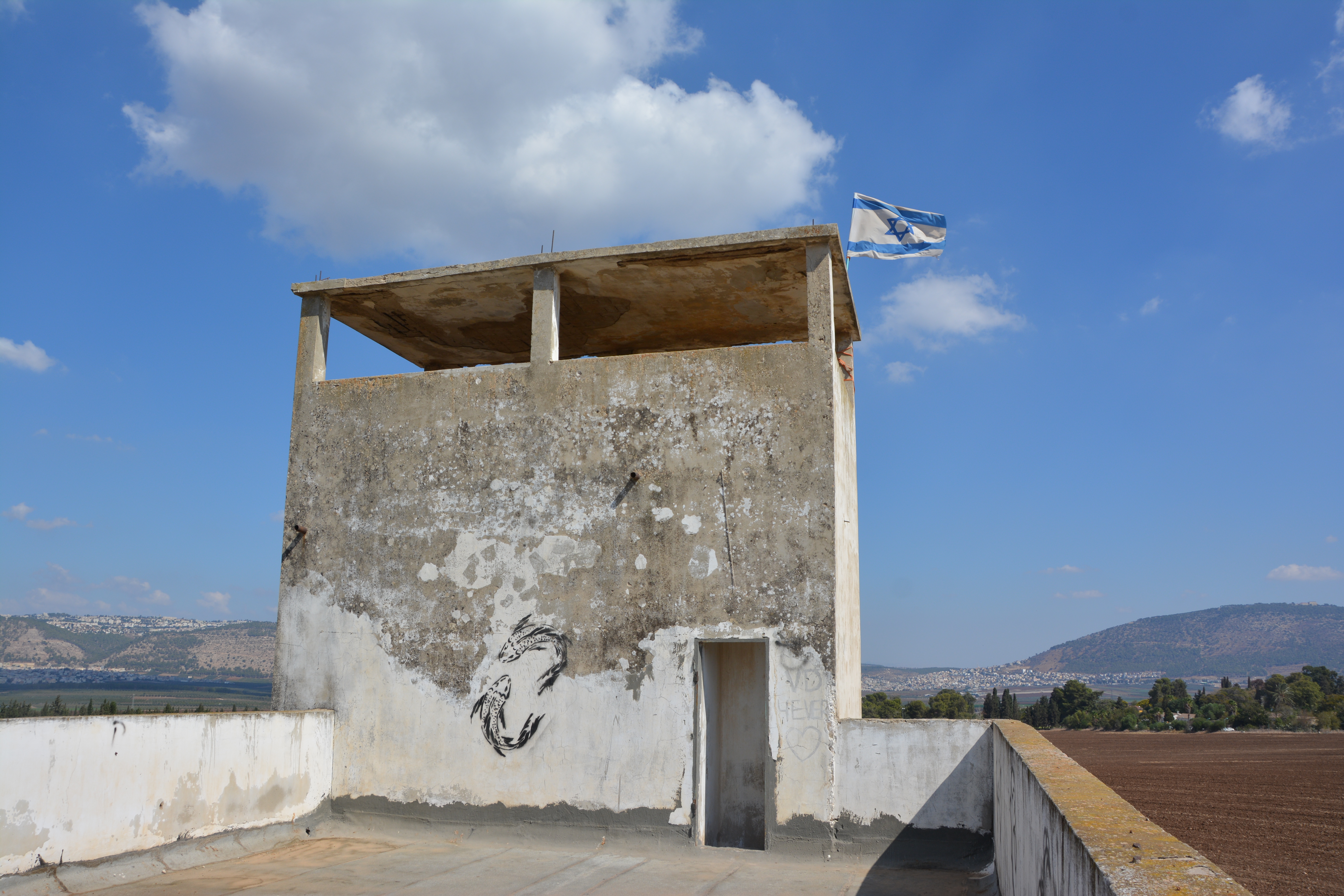 מחנה ישראל (דברת) היה קומונה של פועלי אגודת ישראל שהתארגנה לקראת חיי קיבוץ. אנשי הקבוצה התיישבו על אדמה שנרכשה בשנת 1925 בעמק יזרעאל, ליד קיבוץ דברת של היום.